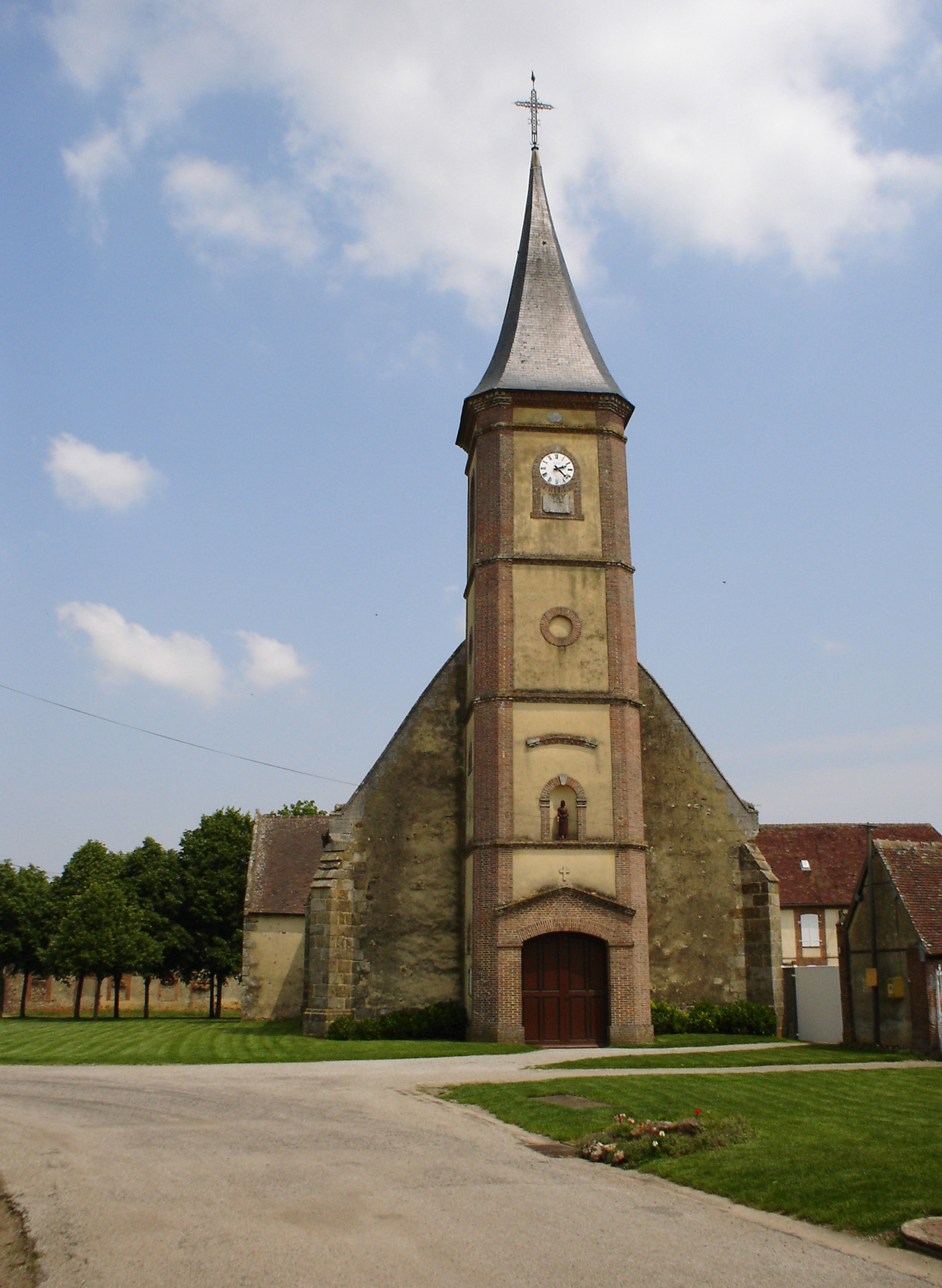 Église Saint-Lambert de Gournay-le-Guérin.